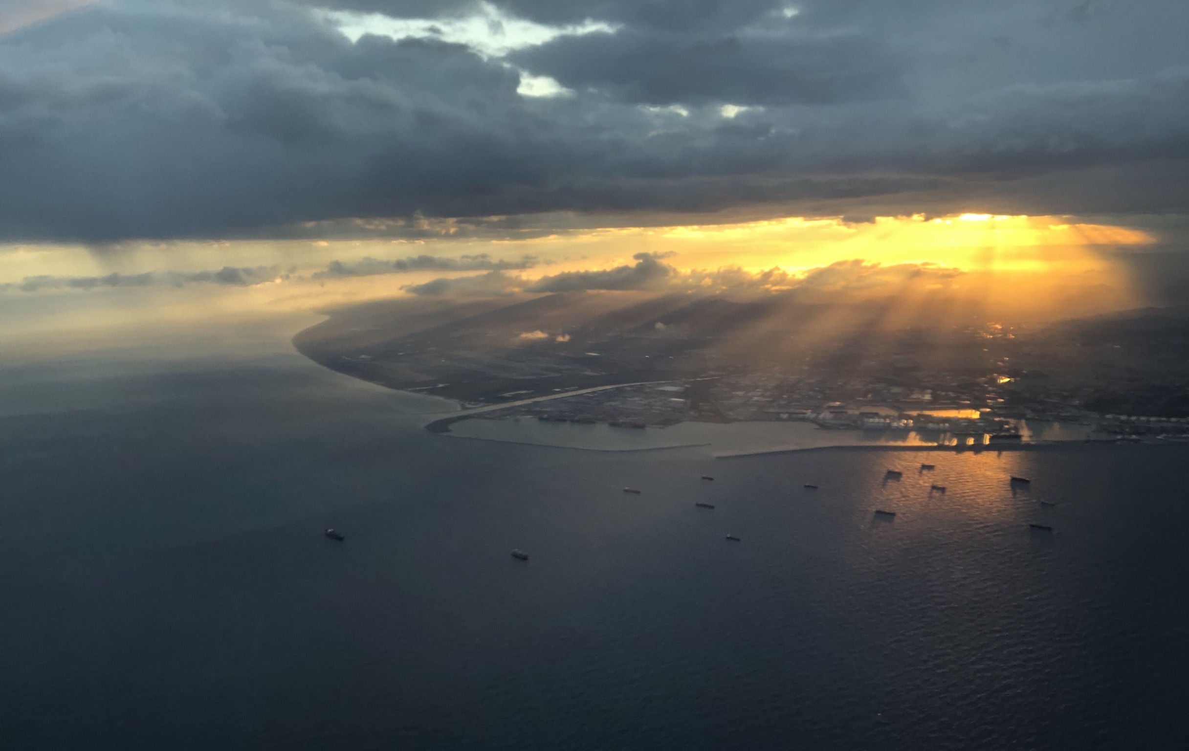 Costa Daurada (Côte Dorée) vue du ciel au soleil couchant depuis un avion au décollage de Barcelone en Espagne